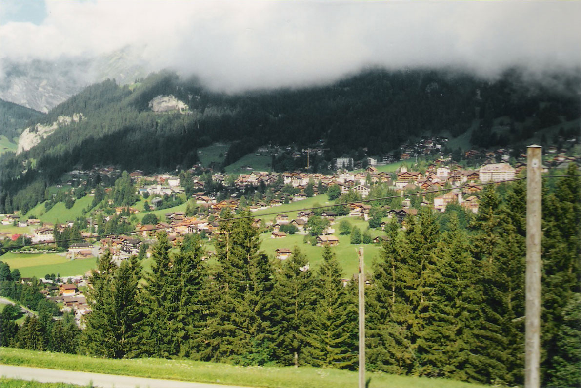 Adelboden, Switzerland, as seen from Our Chalet, summer 2001 Adelboden, Switzerland, as seen from Our Chalet, summer 2001